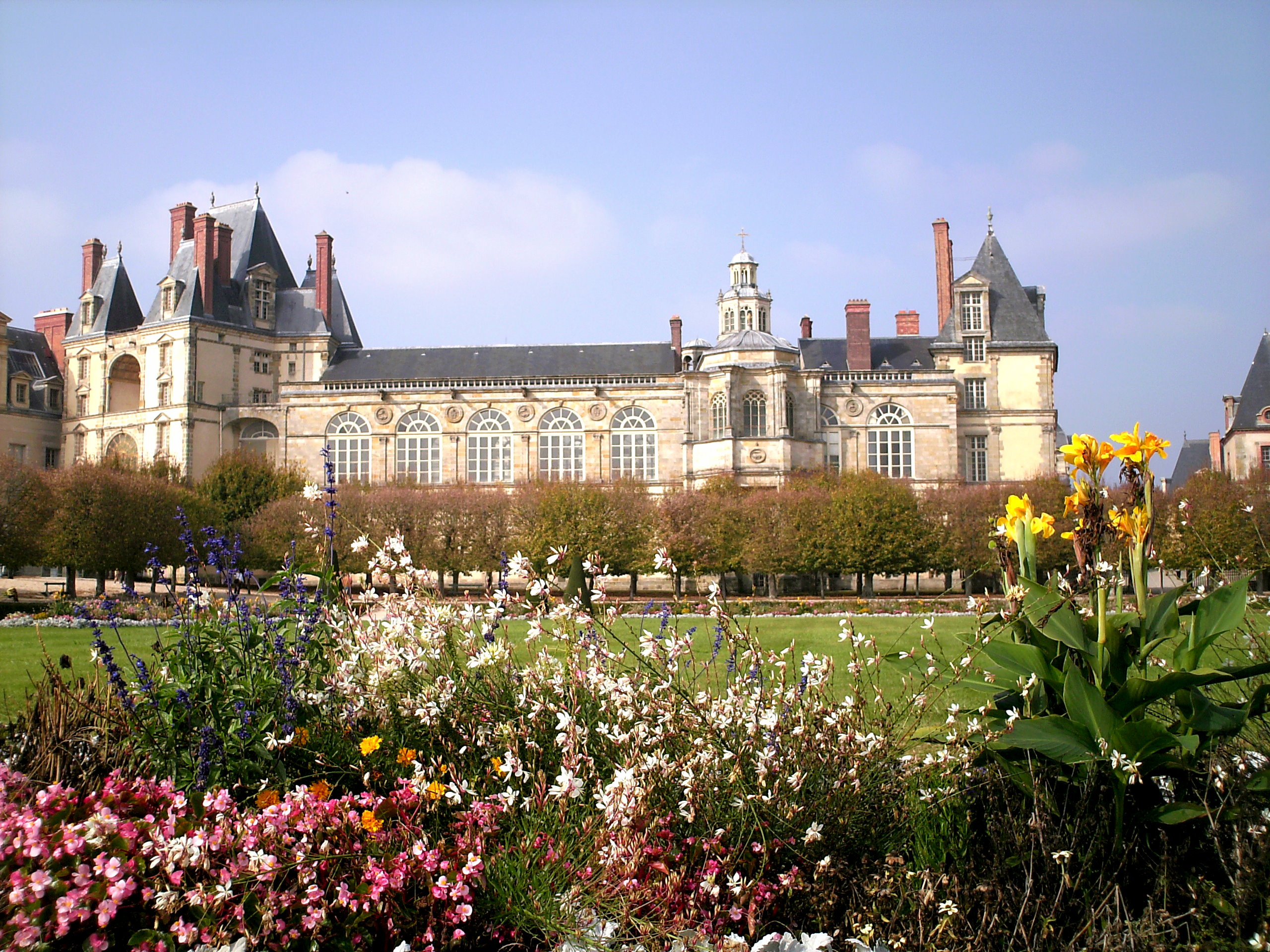 Fontainebleau